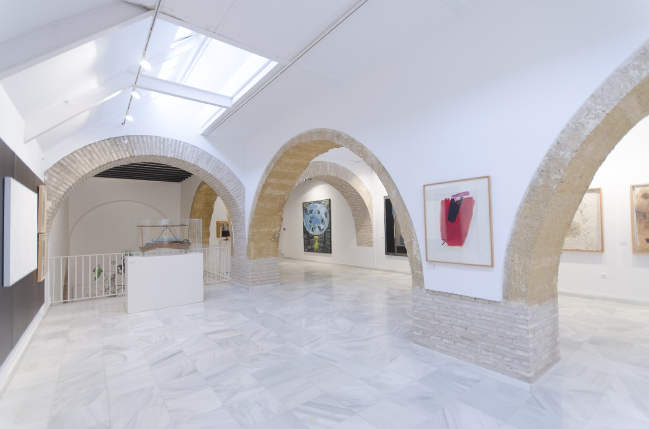 Vista de la primera planta del Museo, que alberga parte de la colección permanente.